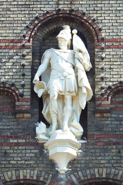 Св. Флоріан: зображення статуї у Львові